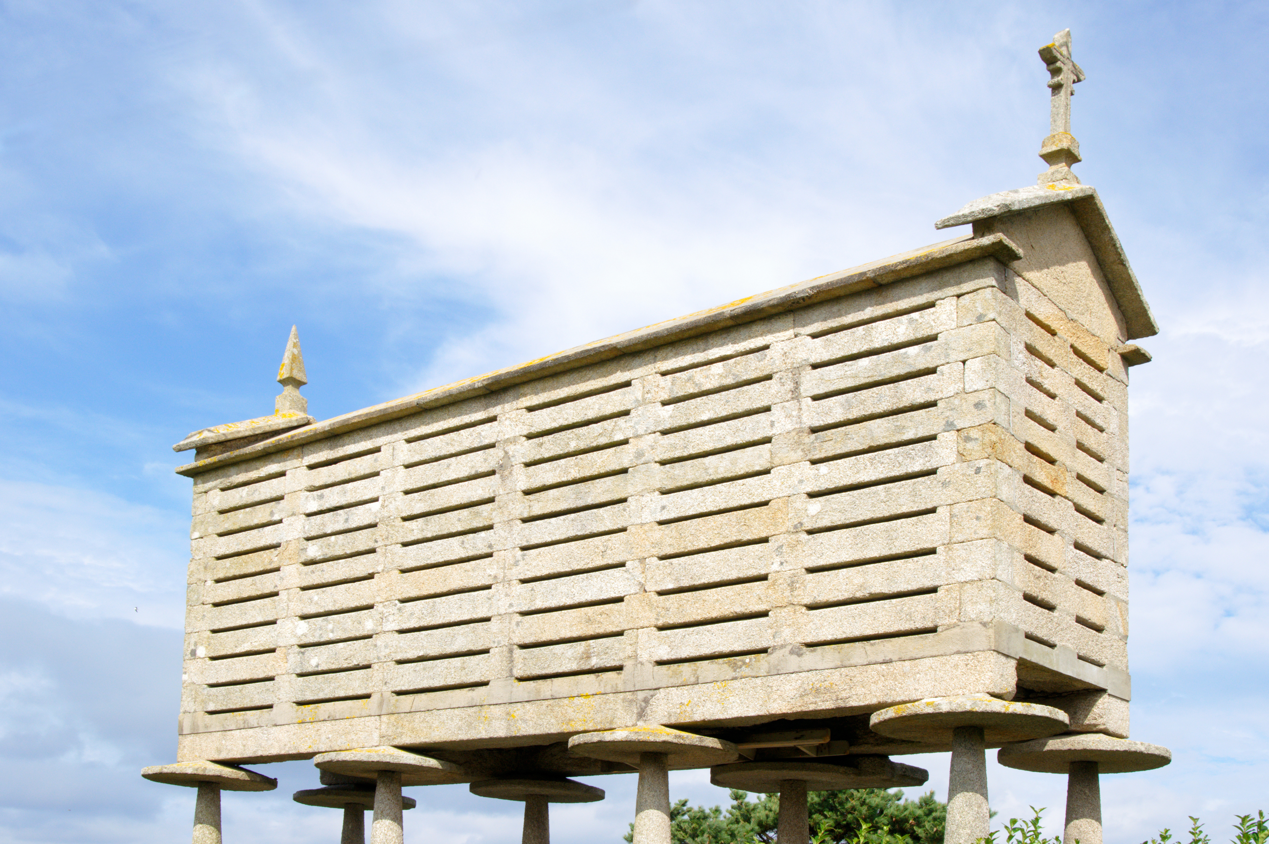 Hórreo en Traba, Galicia